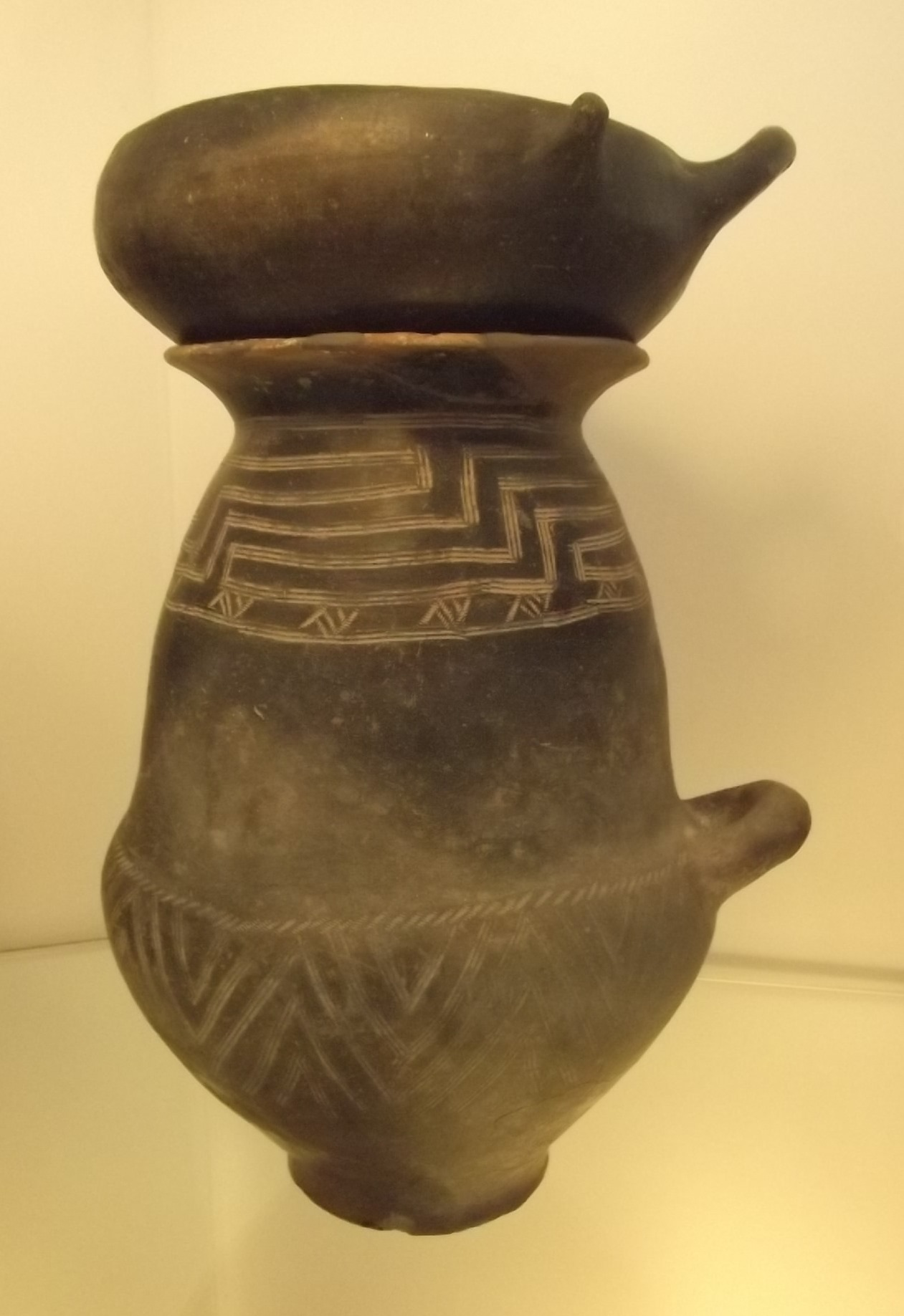 Urne der Villanova-Kultur, ca. 10. Jh. v. Chr., Archäologisches Museum Grosseto